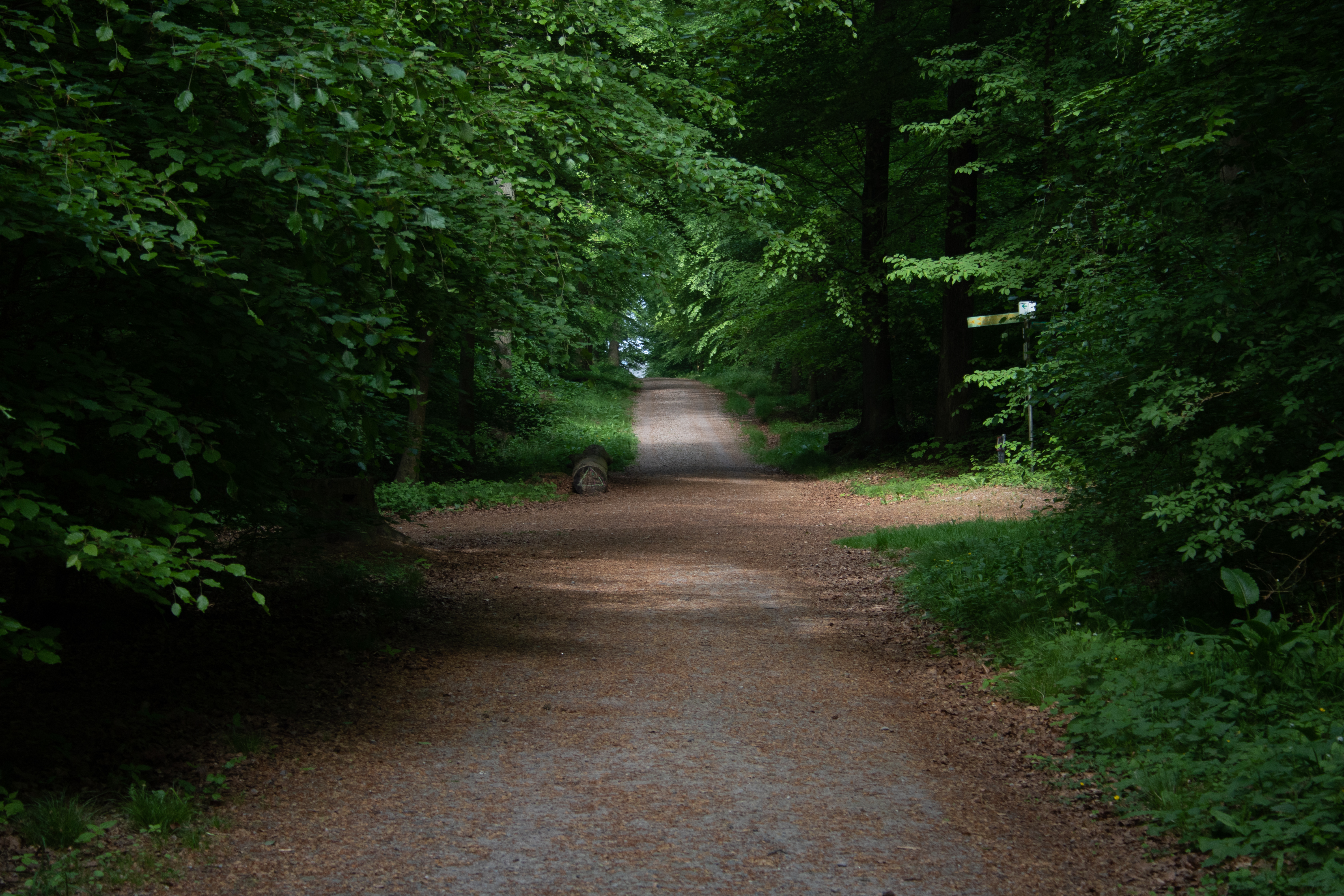 Auf diesem Bild, welches am 12.05.2018 im Höpen (Lanschaftsschutzgebiet LSG WL 00014) aufgenommen wurde, ist die große Kreuzung im zu sehen. Es kreuzen sich hier der Weg, welcher den Westteil Fleestedts mit dem Ostteil, beziehungsweise später über den Hitzenberg mit Meckelfeld und Glüsingen verbindet, sowie der Weg, welcher den Ortskern von Fleestedt mit der Hauptstraße in Meckelfeld sowie dem dort befindlichem Friedhof verbindet. Links und rechts ist der Höpen zu sehen, während weiter hinten im Bild parallel zum Weg ein Baumstamm liegt, auf welchen mit Kreide ein Dreieck gemalt wurde. Auf der rechten Seite des Bildes ist ein Wegweiser mit Zielen in der Umgebung aufgestellt, welchen Wanderer und Radfahrer zur Orientierung nutzen können.